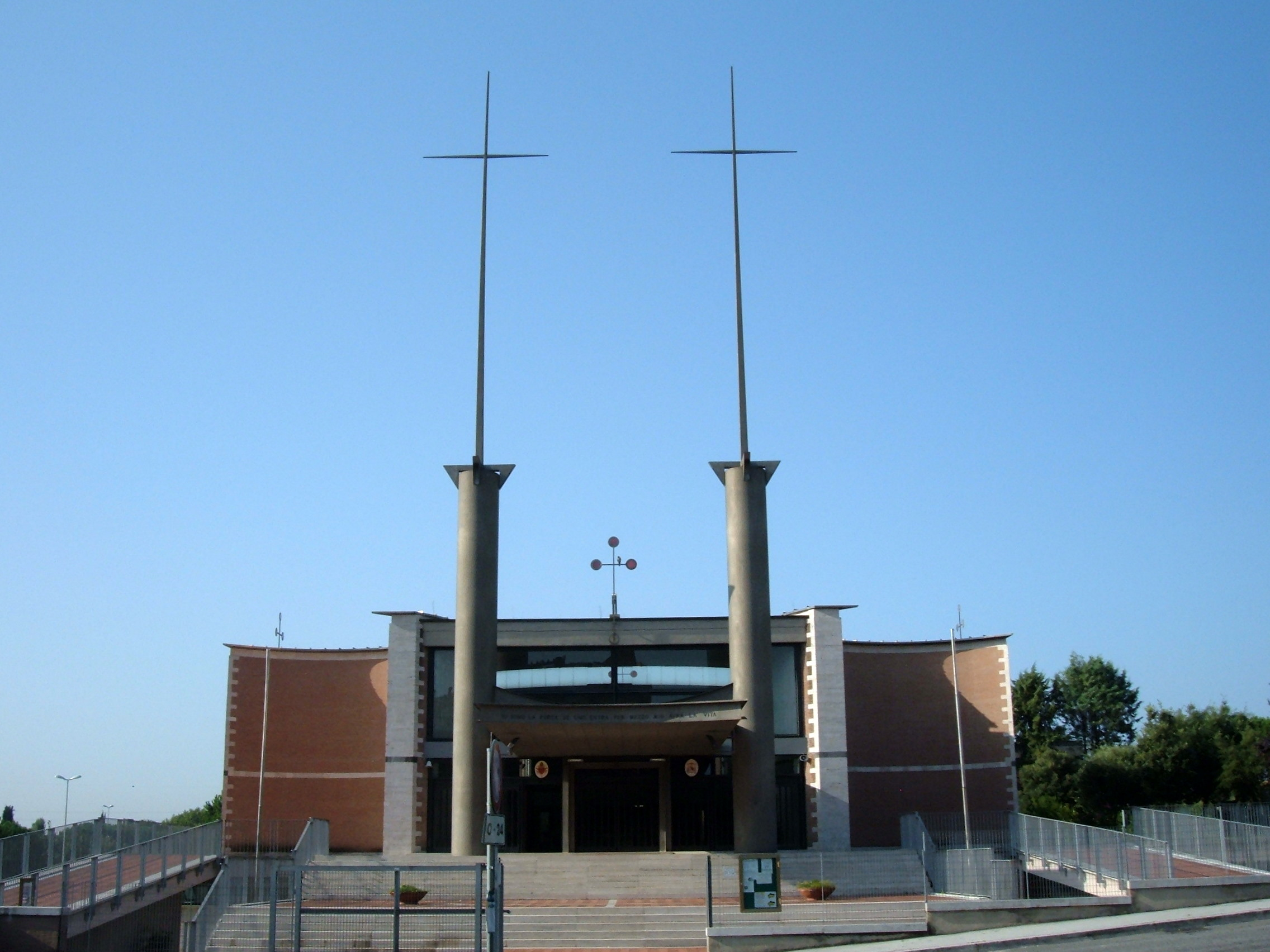 Chiesa di San Liborio, a Roma, nel quartiere Monte Sacro Alto, in via Diego Fabbri.